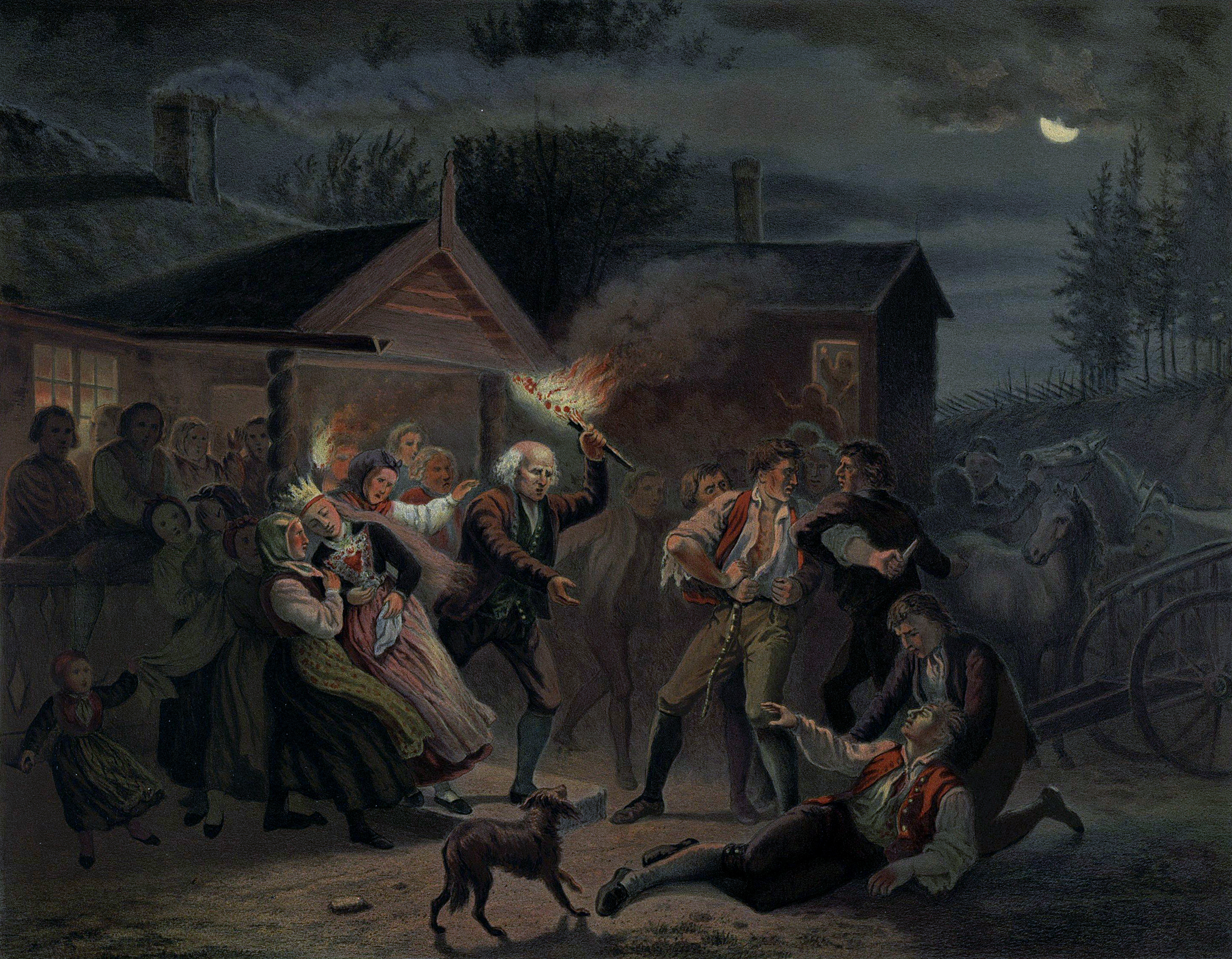 Litografi af Winckelmann & Sönner i Berlin